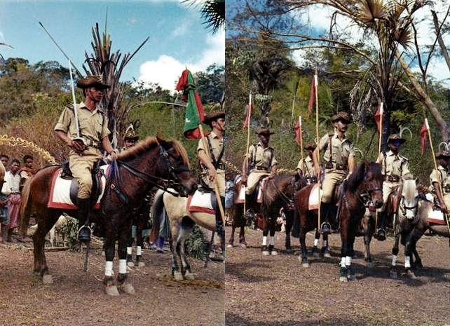 Cavaleiros do Esquadrão de Cavalaria 6 de Atabae em Huto Buicai